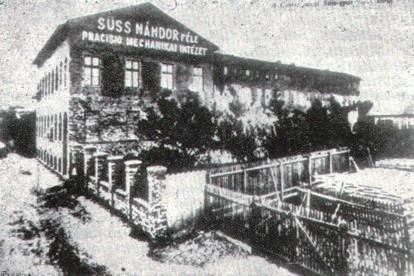 A MOM Csörsz utcai épülete 1905-ben